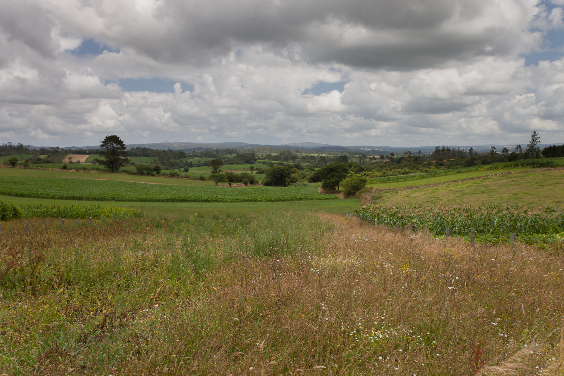 Castro de Foxo, Galiza. Queda próximo á Pereira, o letreiro indicaba ese nome, pero non aparece no Nomenclator da Xunta de Galicia